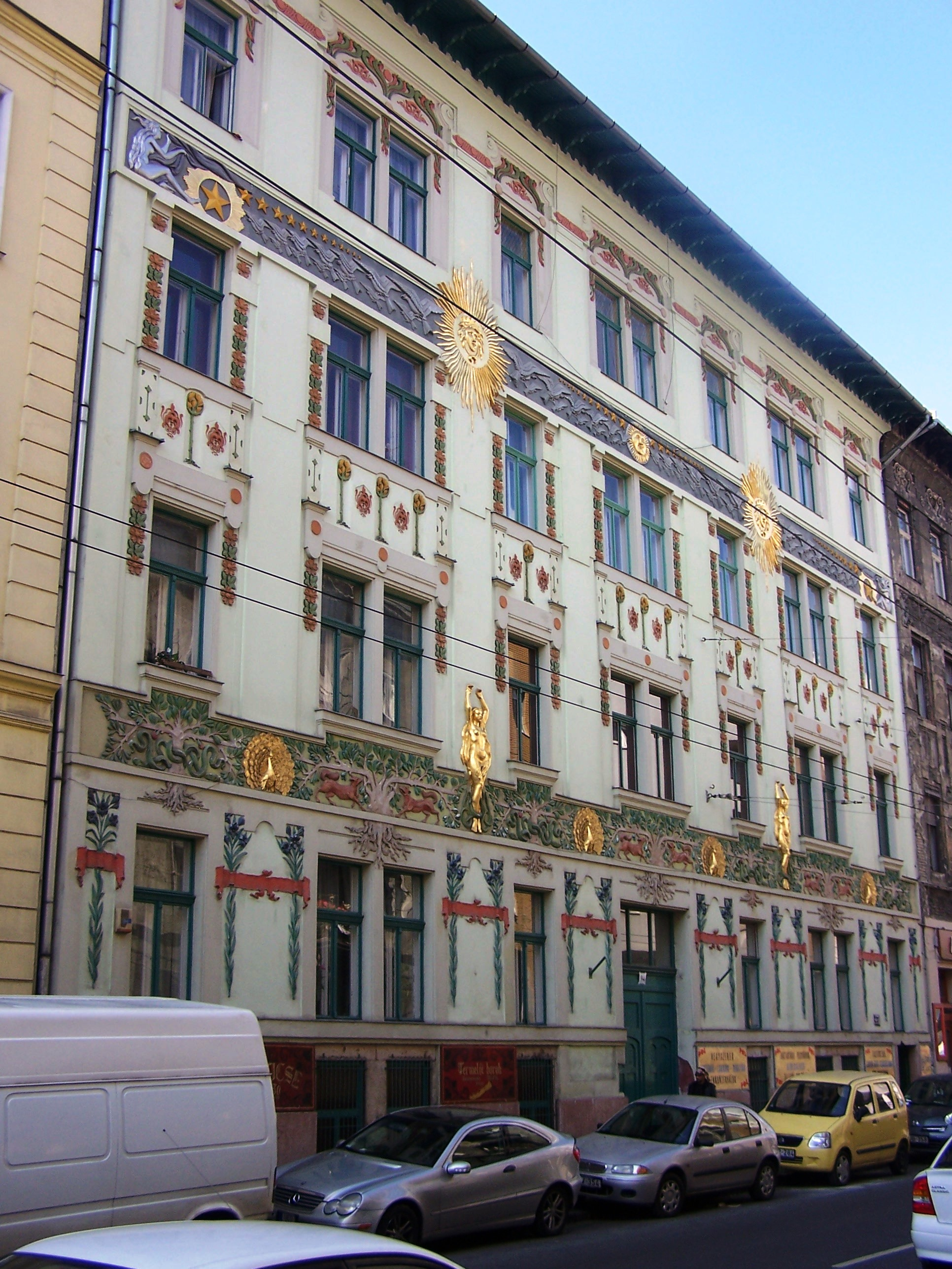 Ház (Budapest 6, Izabella utca 94.) This is a photo of a monument in Hungary. Identifier: 740